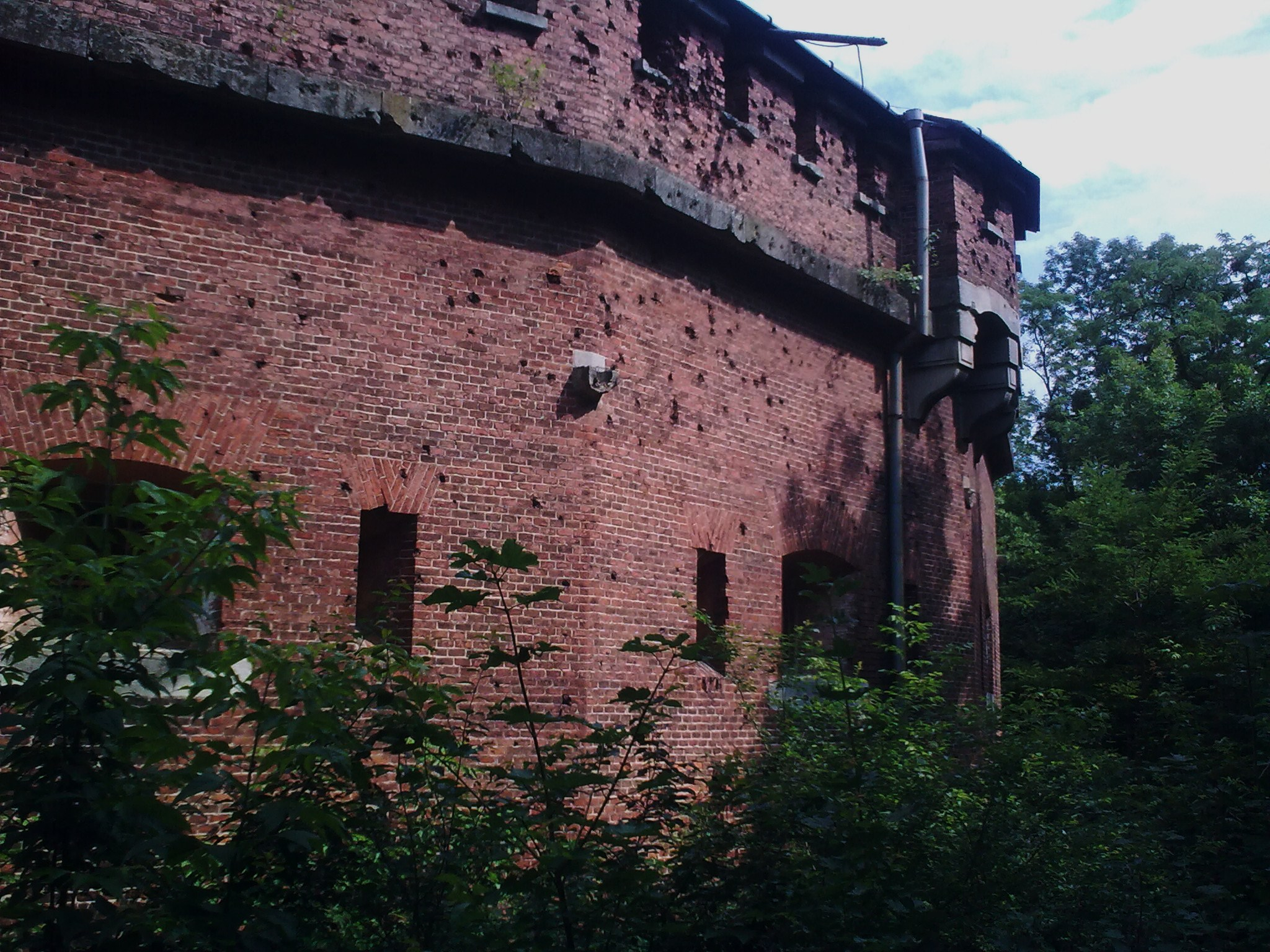 Baszta w cytadeli we Lwowie, magazyn książek